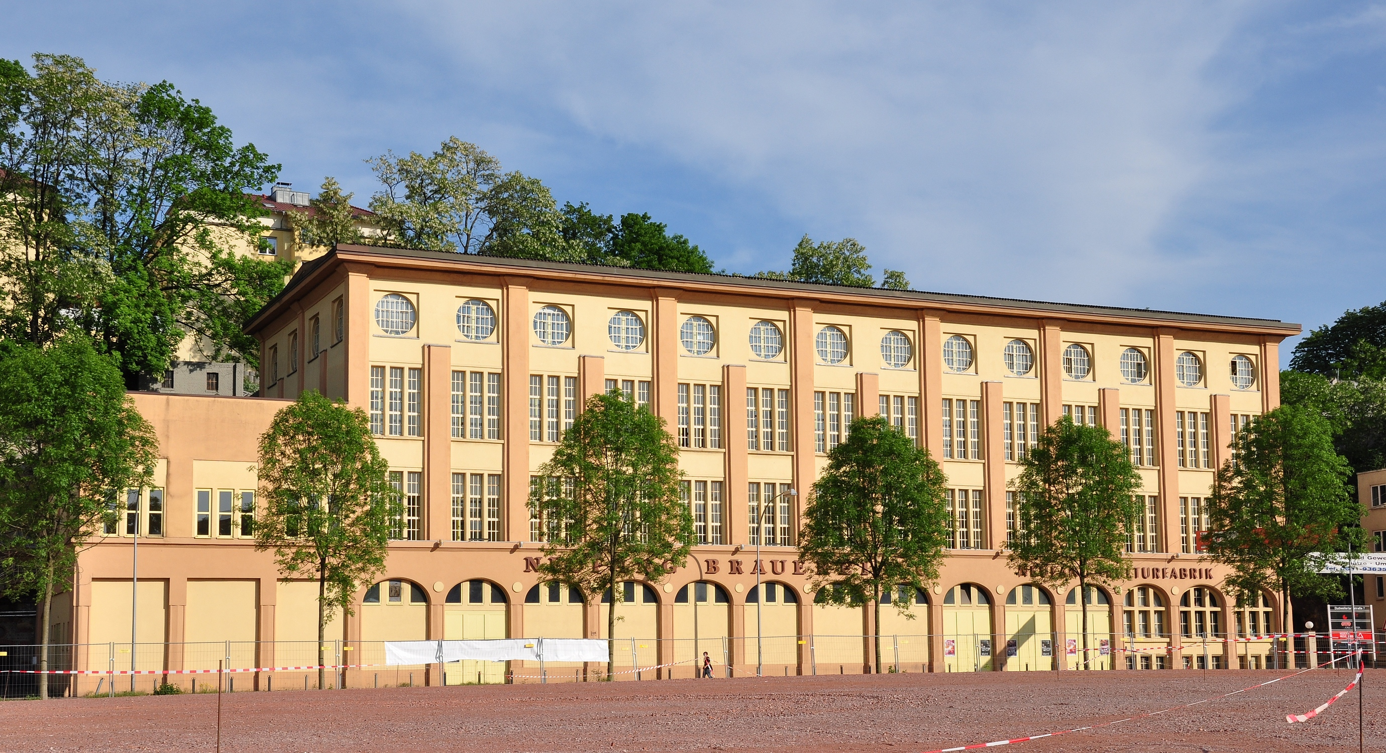 Die ehemalige Neufang-Brauerei, die heutige Kulturfabrik (KuFa)